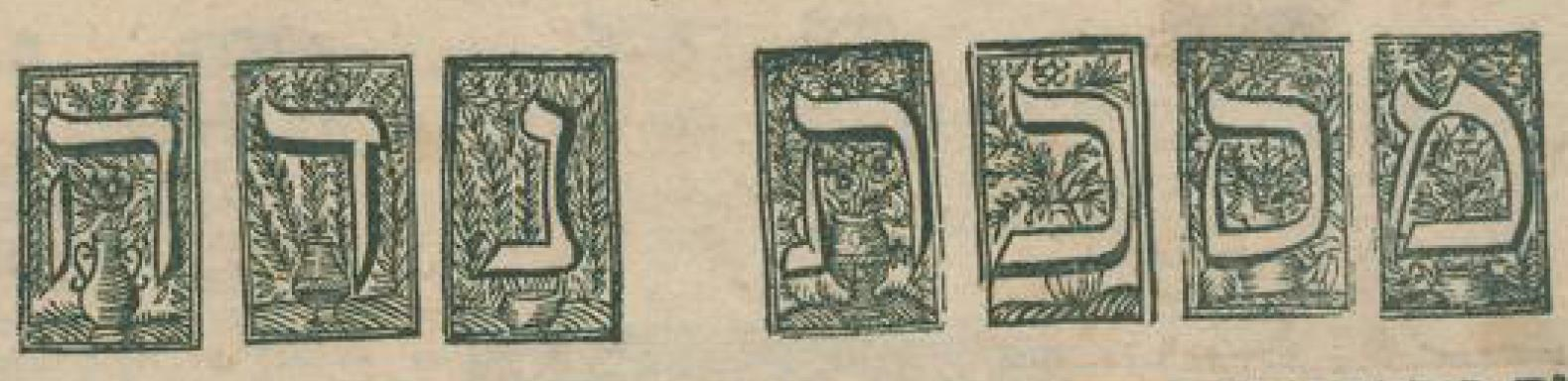 כותרת מעוטרת למסכת נדה בש"ס מהדורת פרנקפורט ה'ת"פ